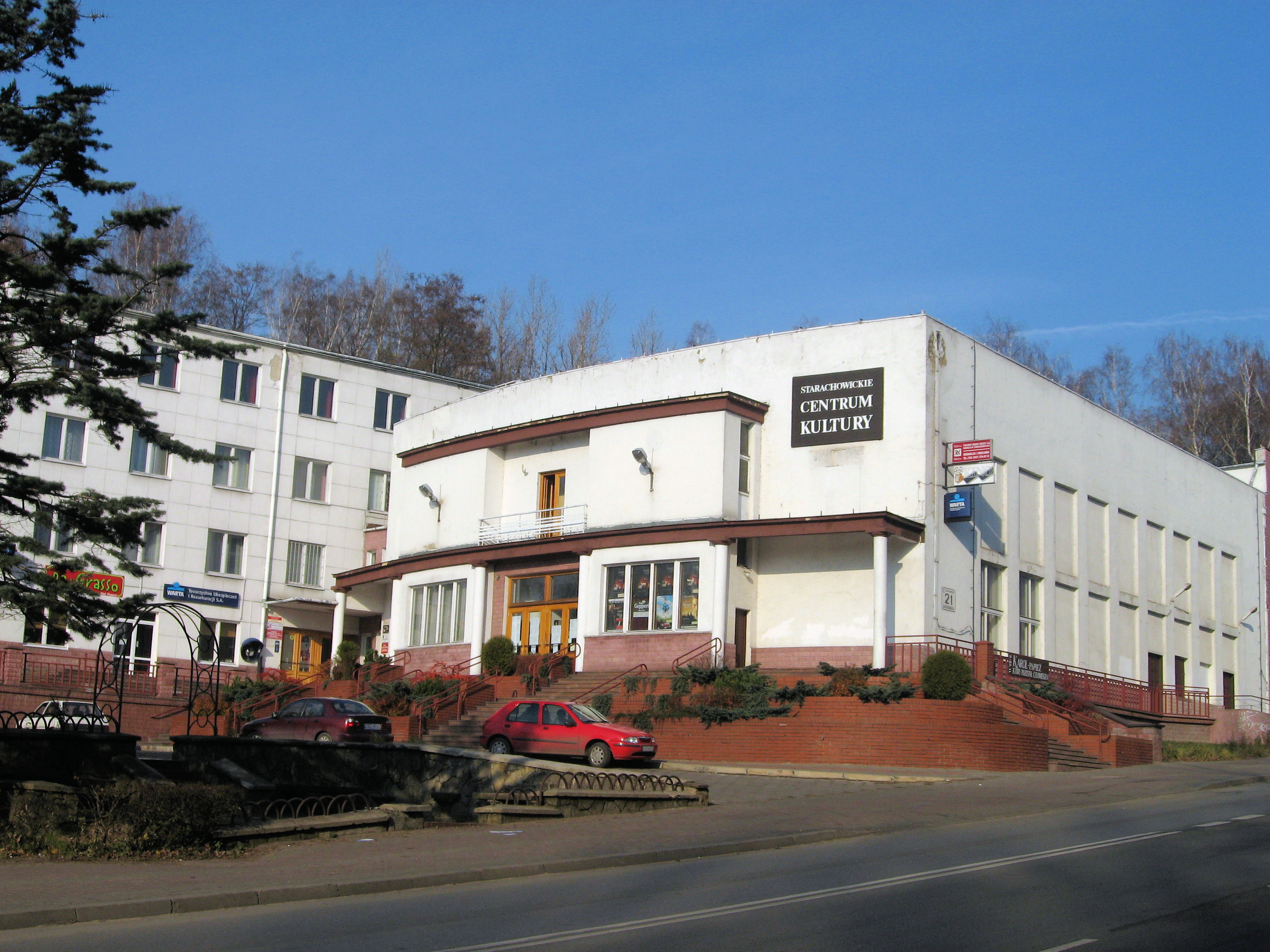 Budynek Starachowickiego Centrum Kultury przy ul. Radomskiej 21